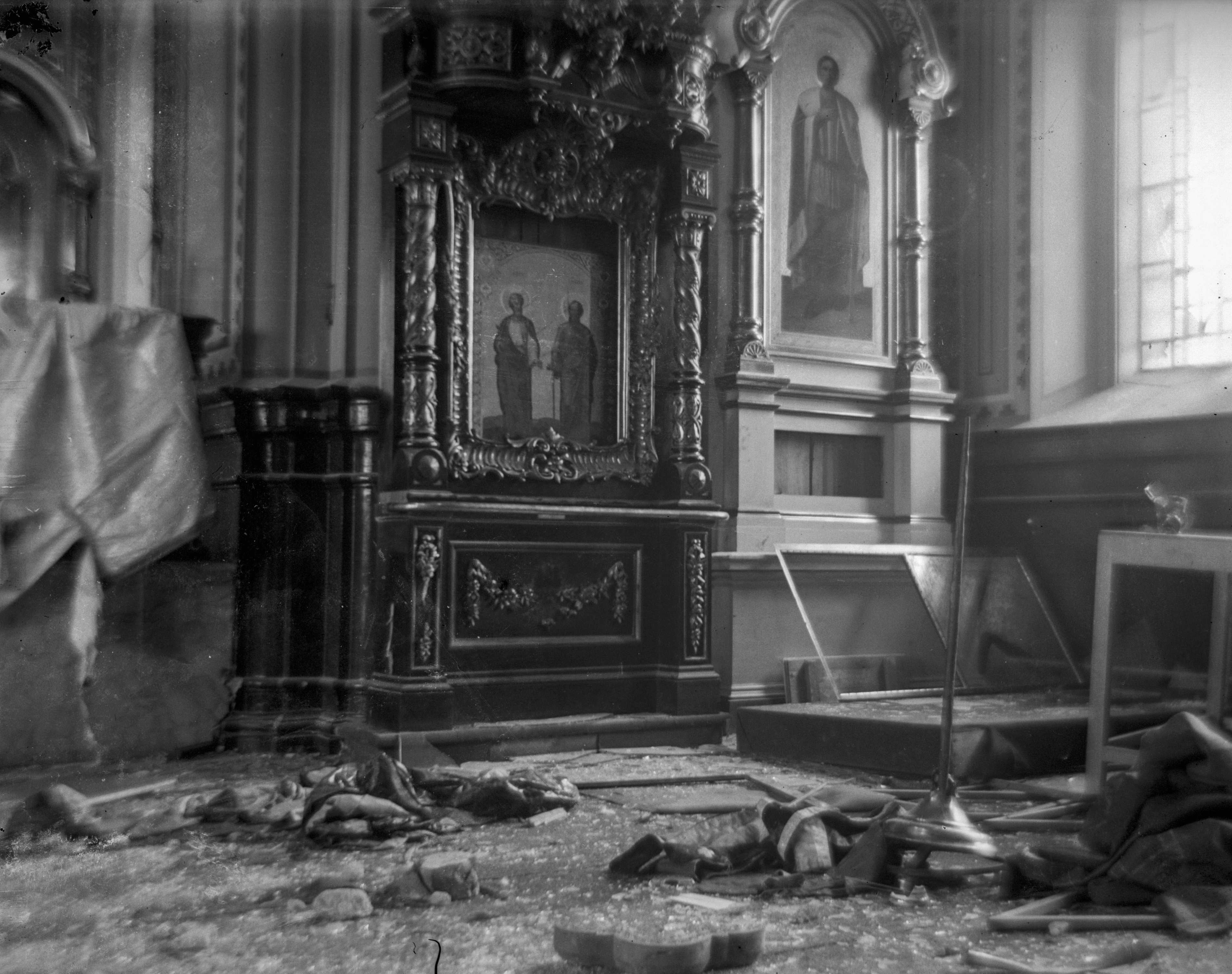 CC-BY Tampere 1918, kuvaaja tuntematon, Vapriikin kuva-arkisto. Finnish Civil War 1918, Photographer unknown, Vapriikki Photo Archives.